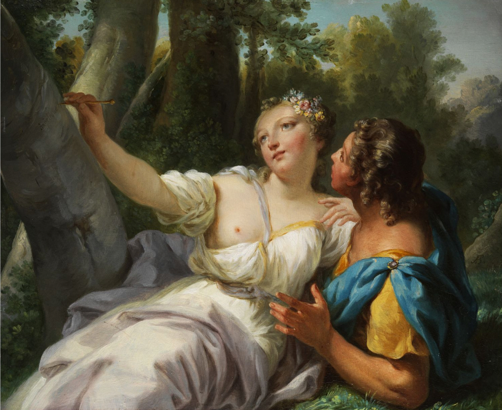 Angelica et Medoro, Öl auf Holz, 26 x 31 cm